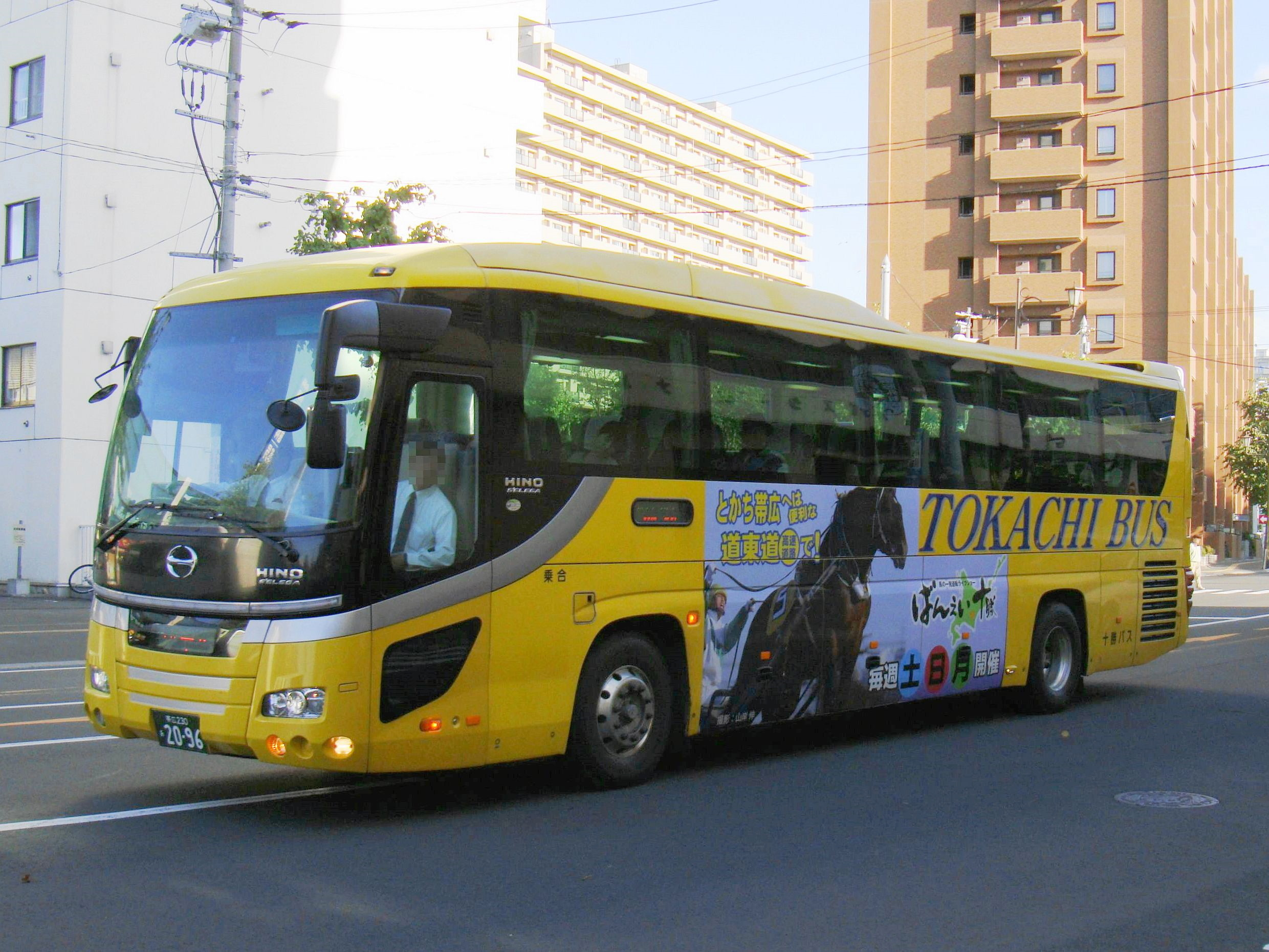 "Potato Liner" Sapporo to Obihiro